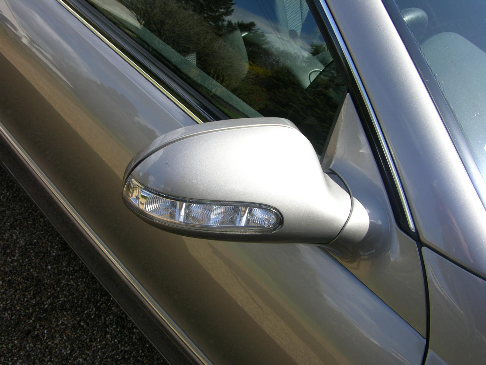 Mercedes Benz CLK 200 Kompressor